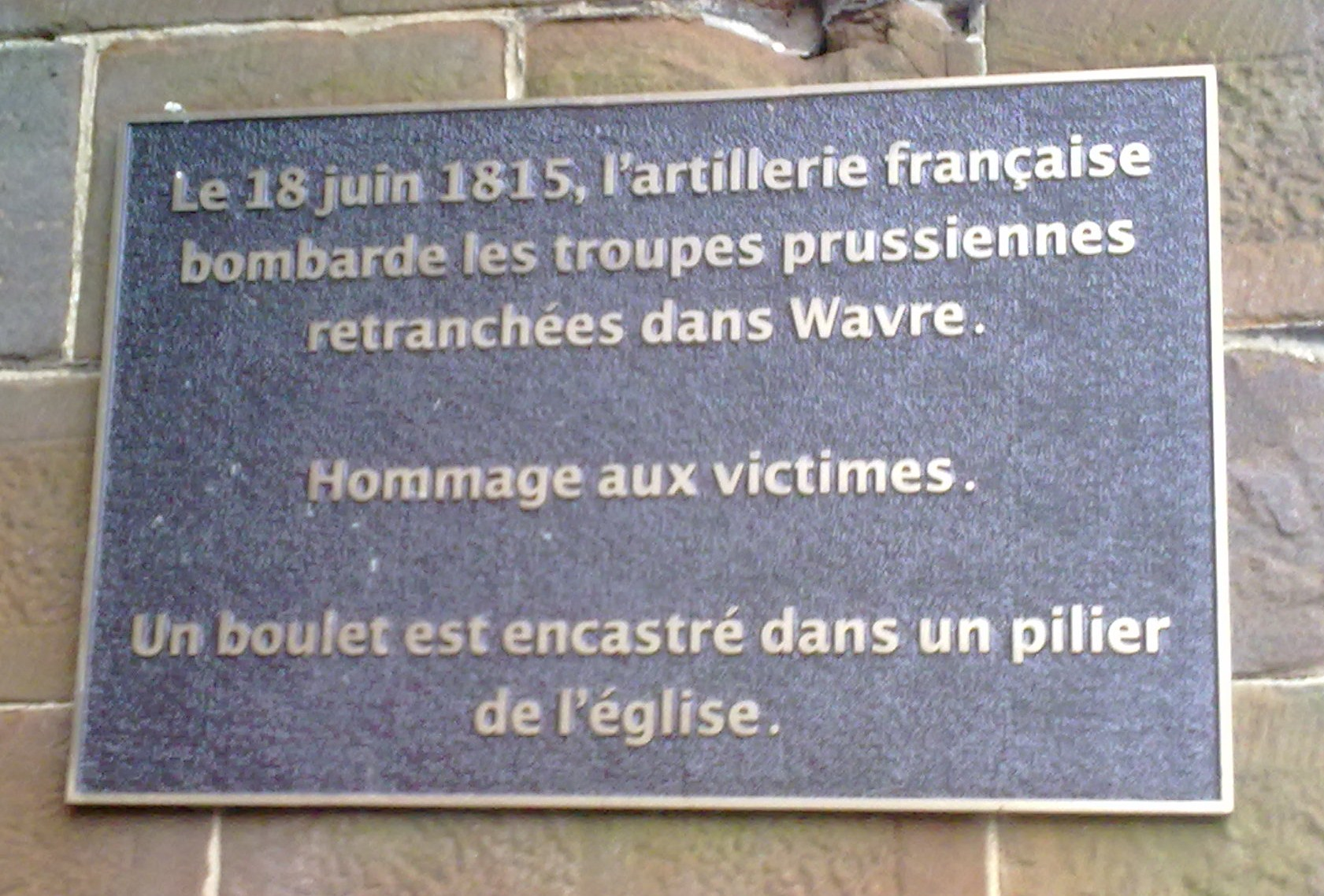 Eglise Saint Jean Baptiste de Wavre. Plaque commémorative des combats de 1815. Boulet dans un des piliers.